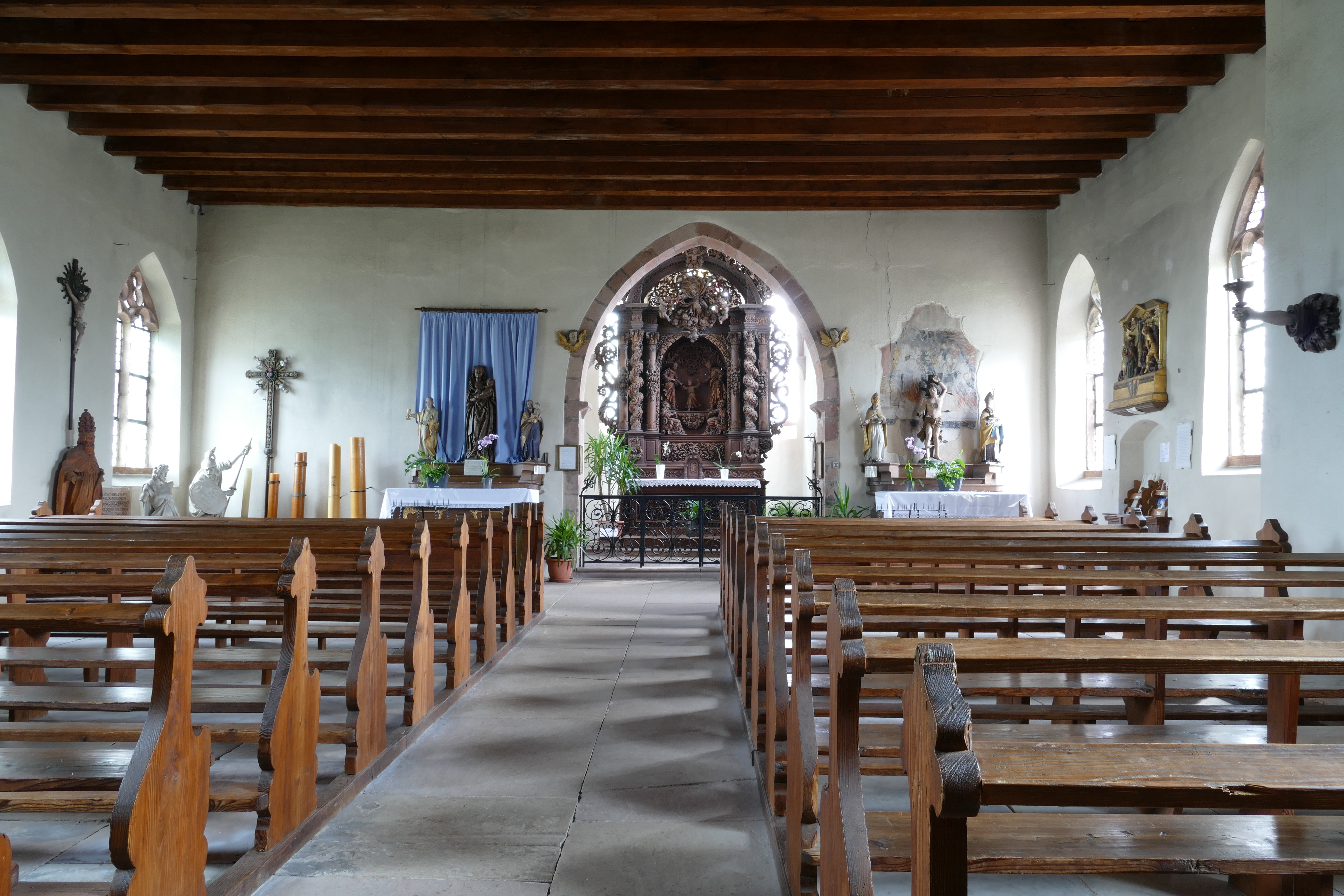 Alsace, Bas-Rhin, Chapelle Saint-Sébastien de Dambach-la-Ville (PA00084677, IA00115228). Vue intérieure.